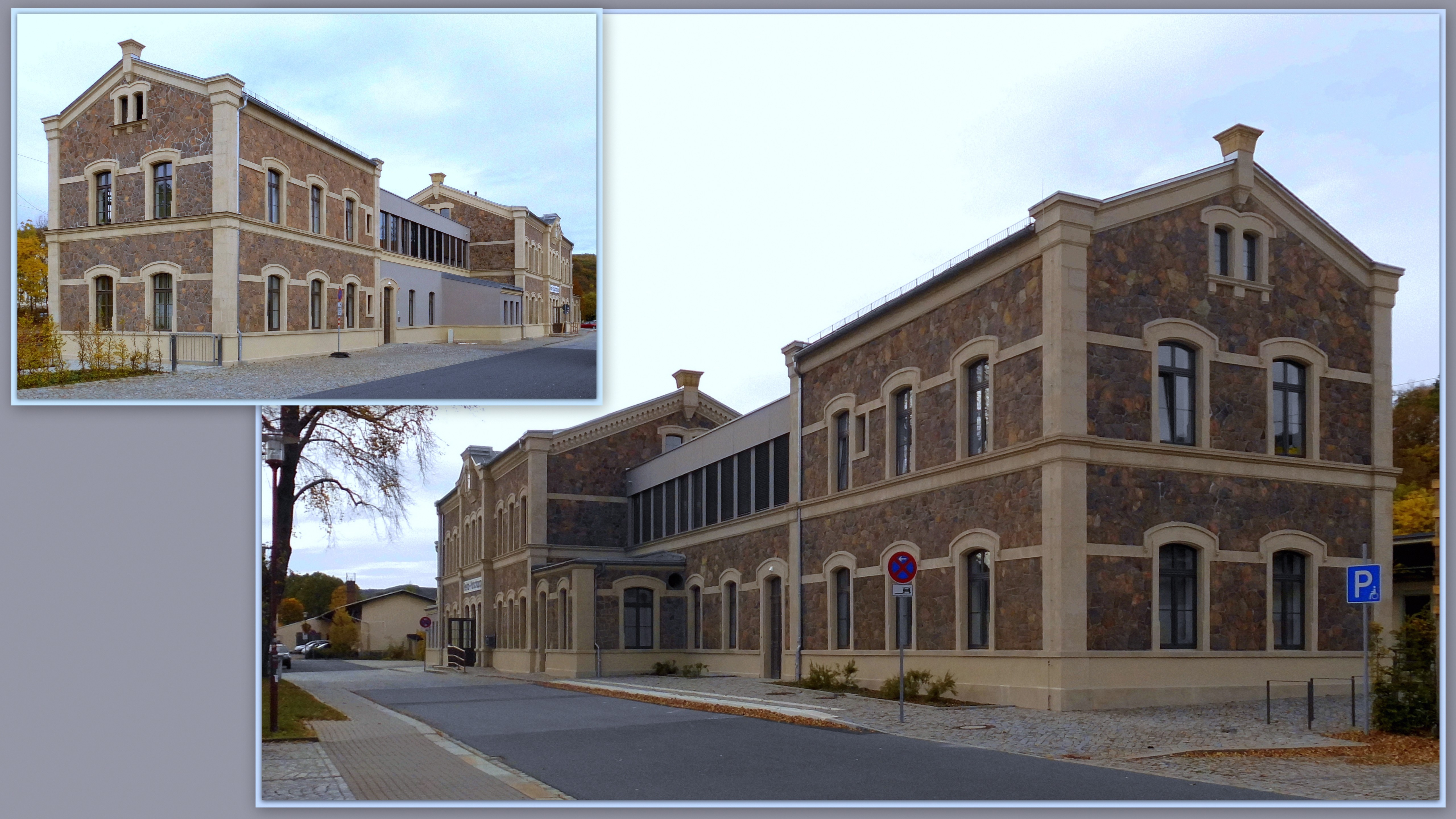 2019 Freital neues Bürgerhaus im ehemaligen Bahnhof Freital Potschappel. Jetzt verschiedene Ämter des Rathauses Freital und Bürgerbereiche.